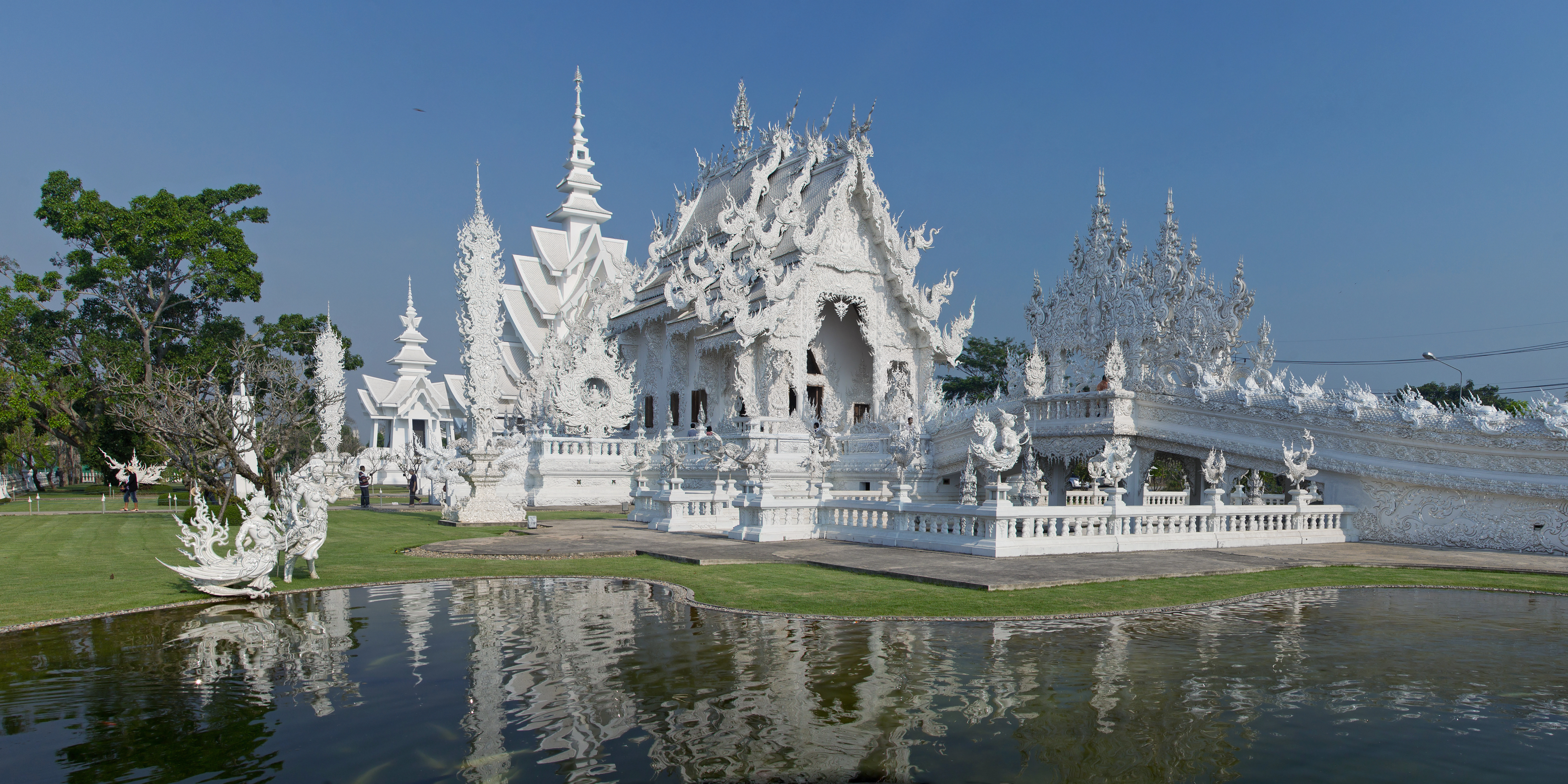 Wat Rong Khun, Chiang Rai, Chiang Rai Province, Thailand